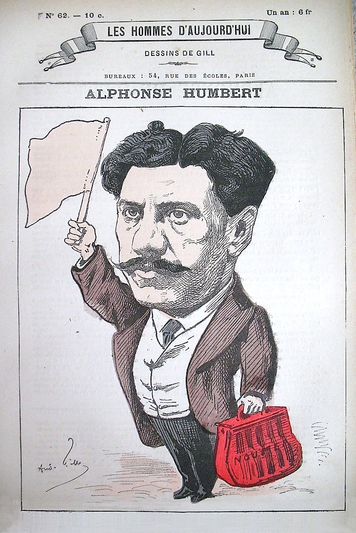 Alphonse Humbert (1844-1922). Caricature par André Gill pour le N° 62 des Hommes d'aujourd'hui, 1879